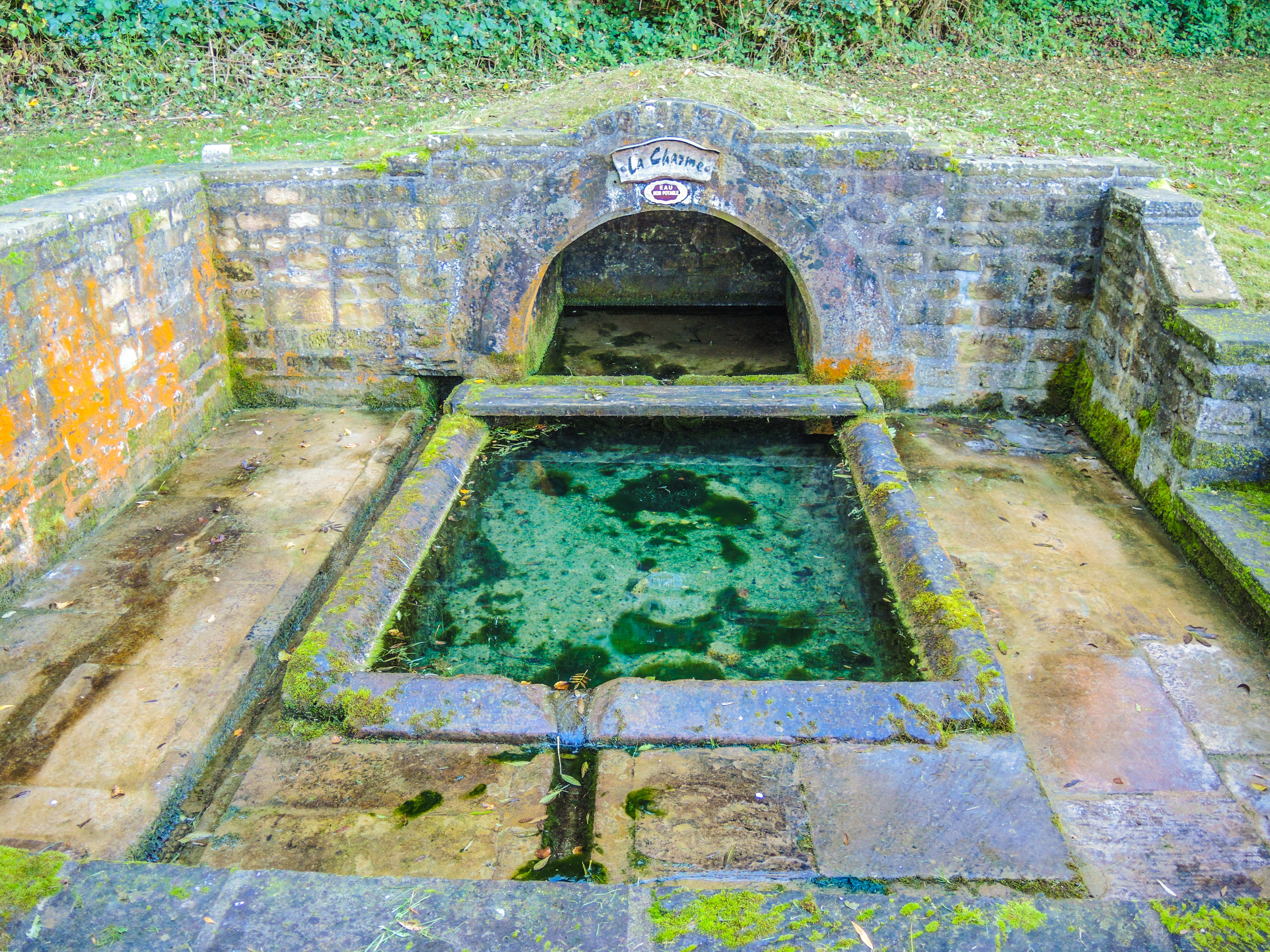 Fontaine de la Charme, à Dorans. Territoire de Belfort.